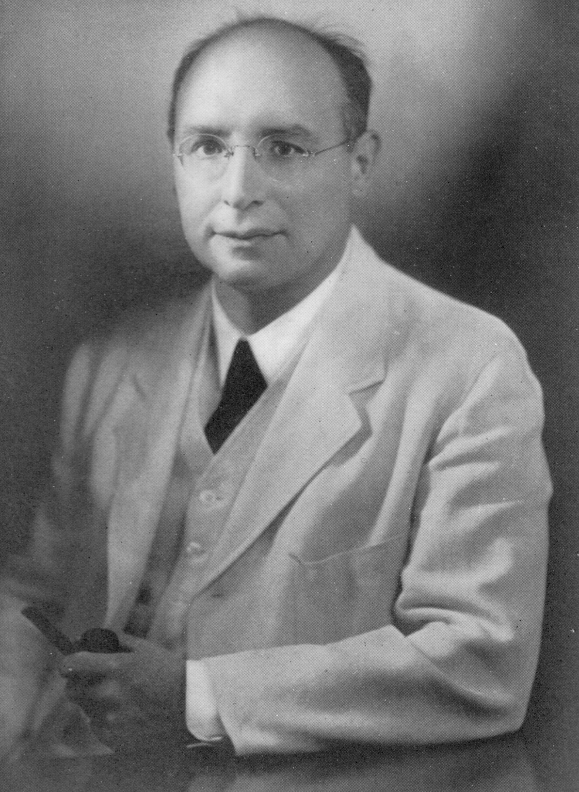 Portrait George Sarton